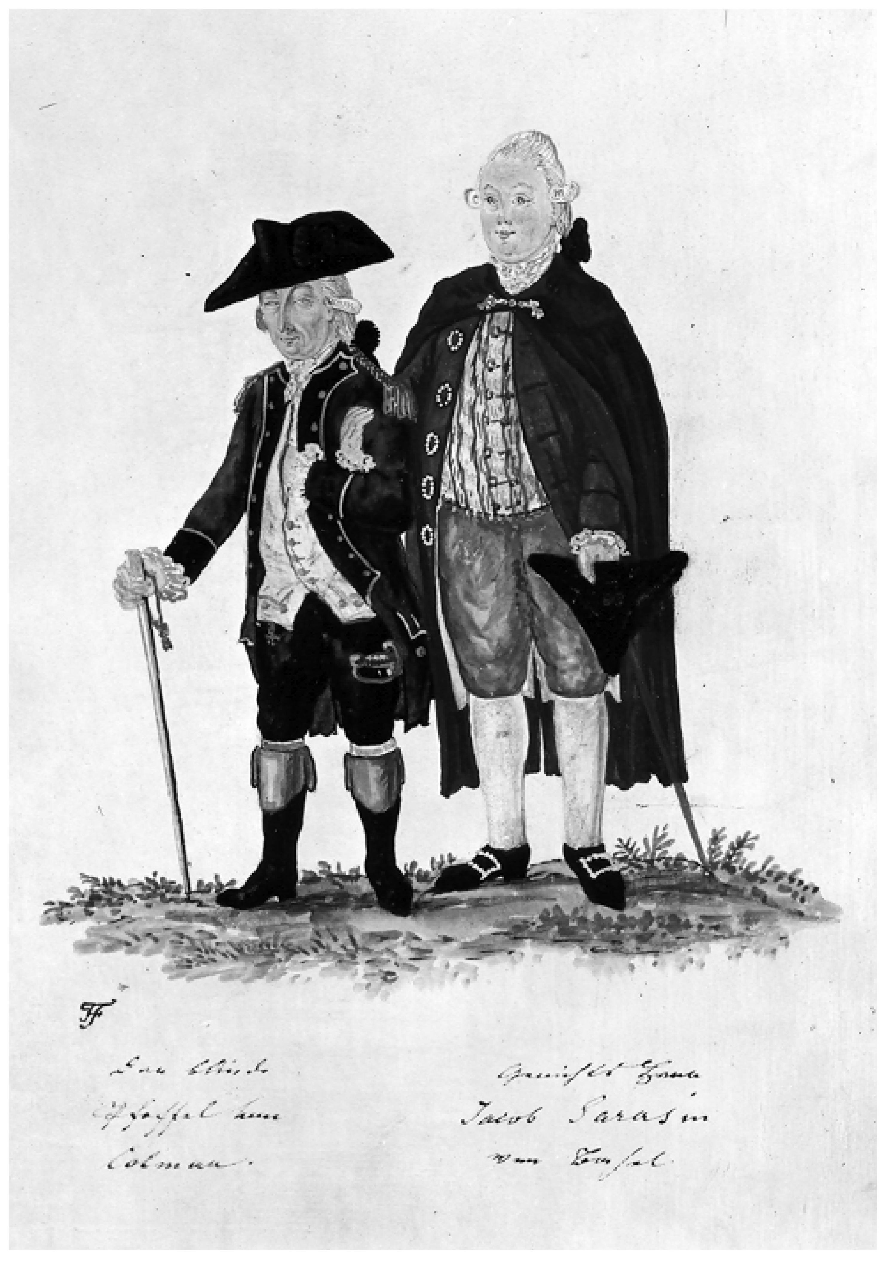 Der blinde Pfeffel von Colmar und Gerichtsherr Jacob Sarasin von Basel. Aquarell von F. Feyerabend. UB Basel: Manuskript Falk. 72, Blatt 5